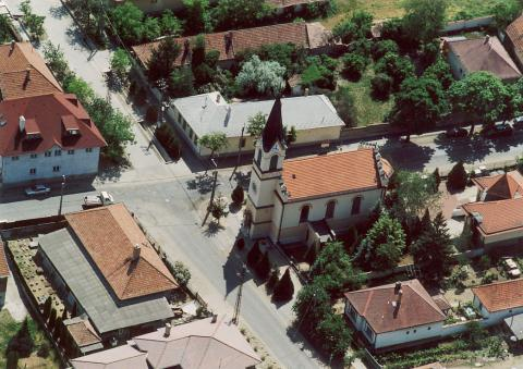 Csömör, Hungary, aerial photography. Evangélikus templom